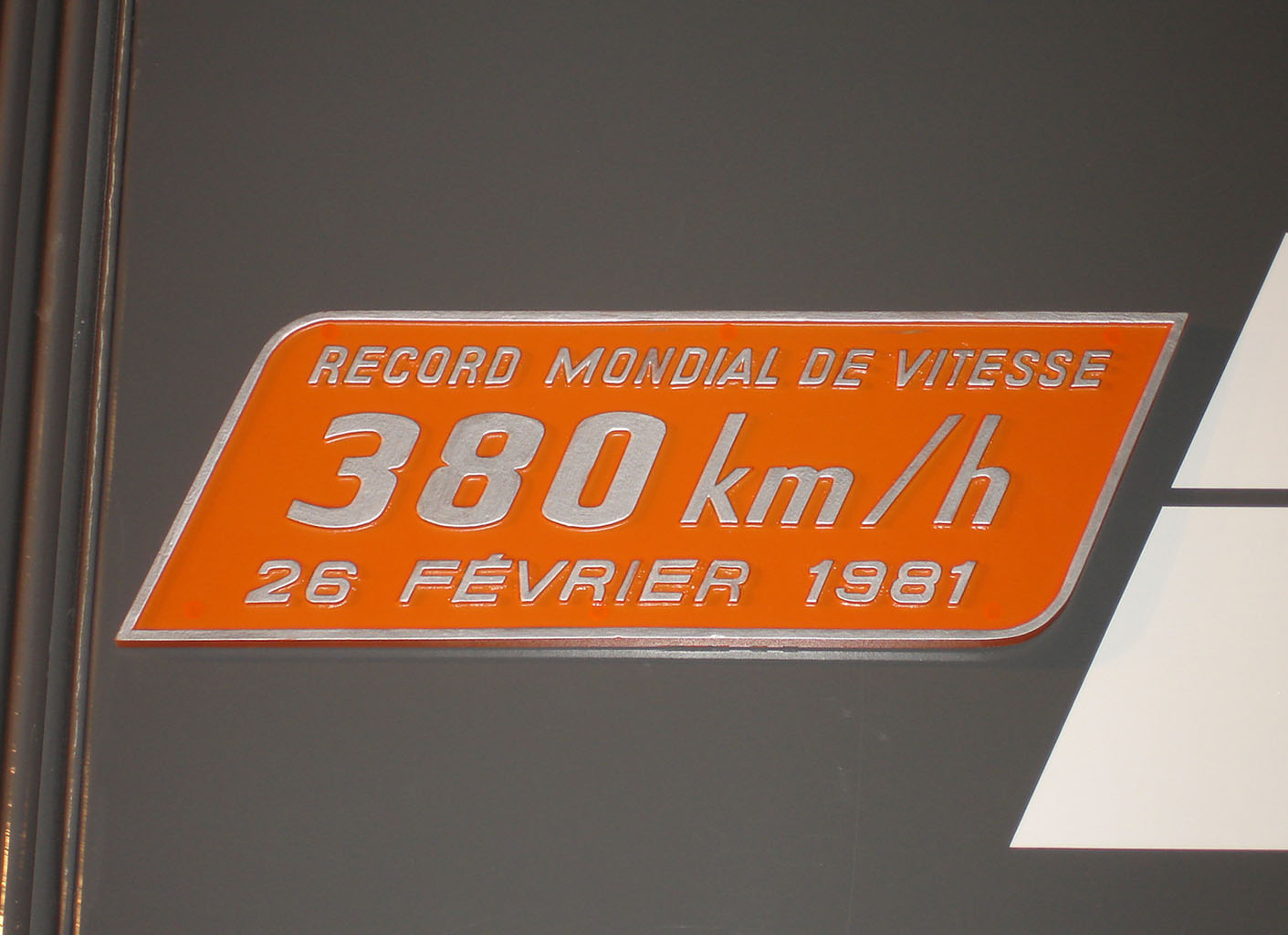 Plaque sur la motrice de la rame 16 du TGV Sud-Est, détentrice du record mondial de vitesse du 26 février 1981 à 380km/h Nef du Grand Palais à Paris, France Décembre 2007 Photo personnelle (own work) de Clicsouris